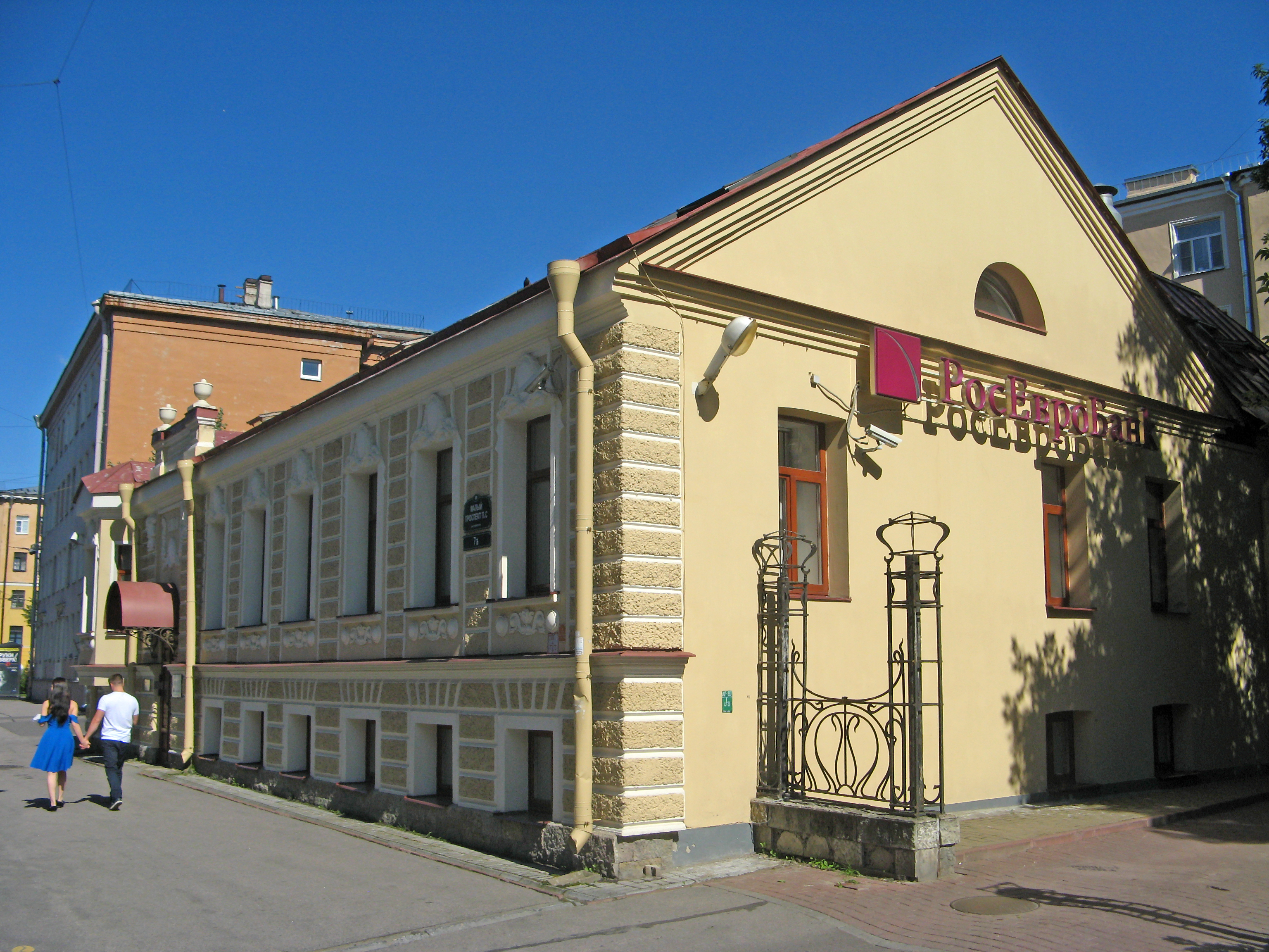 Особняк А.Н. Копец: Малый проспект Петроградской стороны, 7А, Петроградский район, Санкт-Петербург